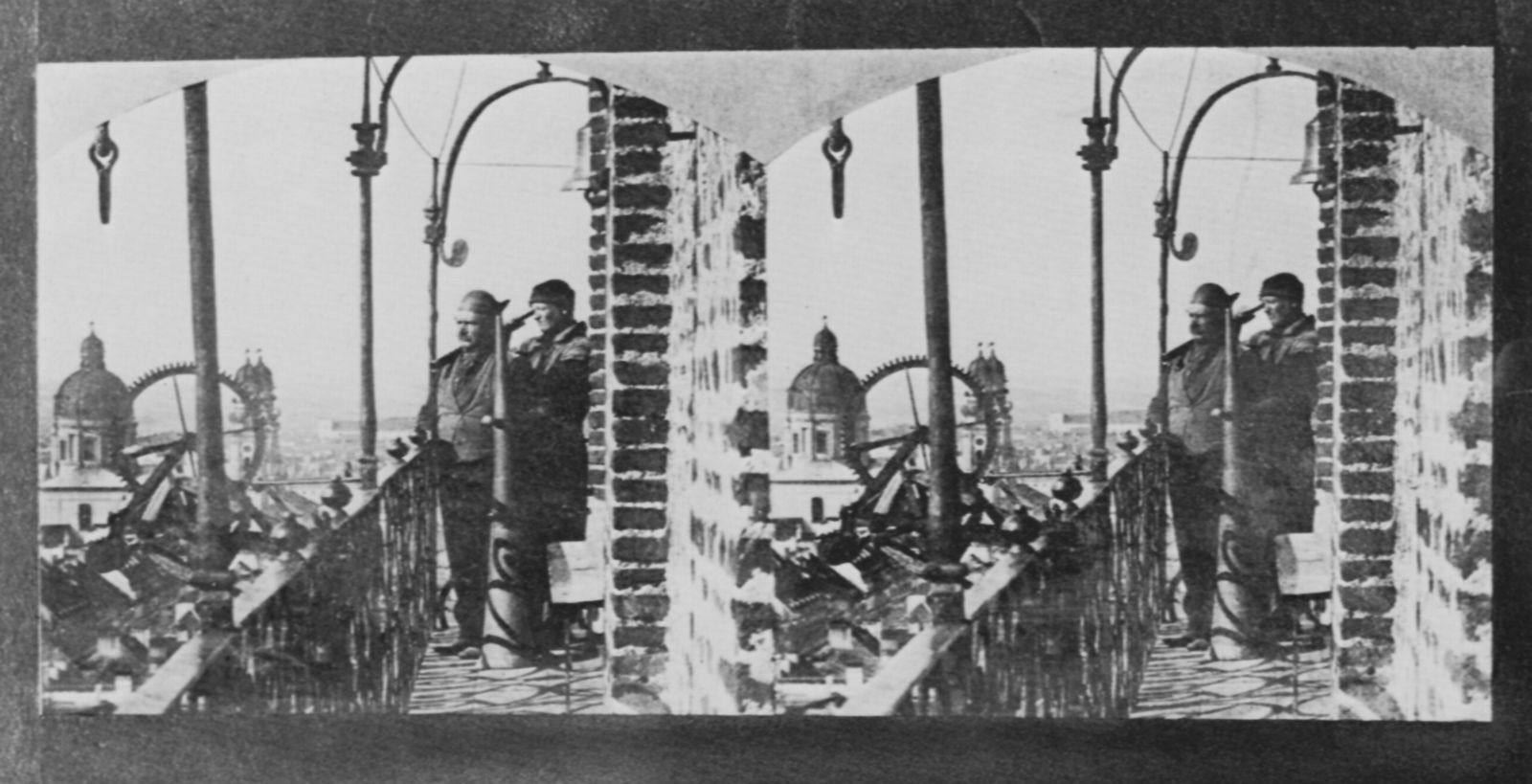 Feuerwächter auf dem Turm der Peterskirche in München, Stereo-Fotografie